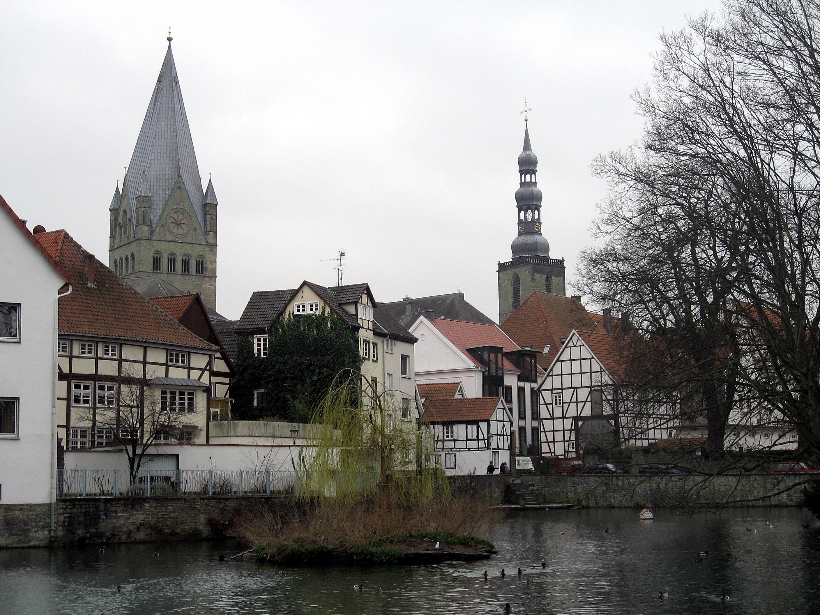 Soest, Großer Teich, Blick von der Teichsmühle aufs Zentrum, links der Dom, rechts die Petrikirche